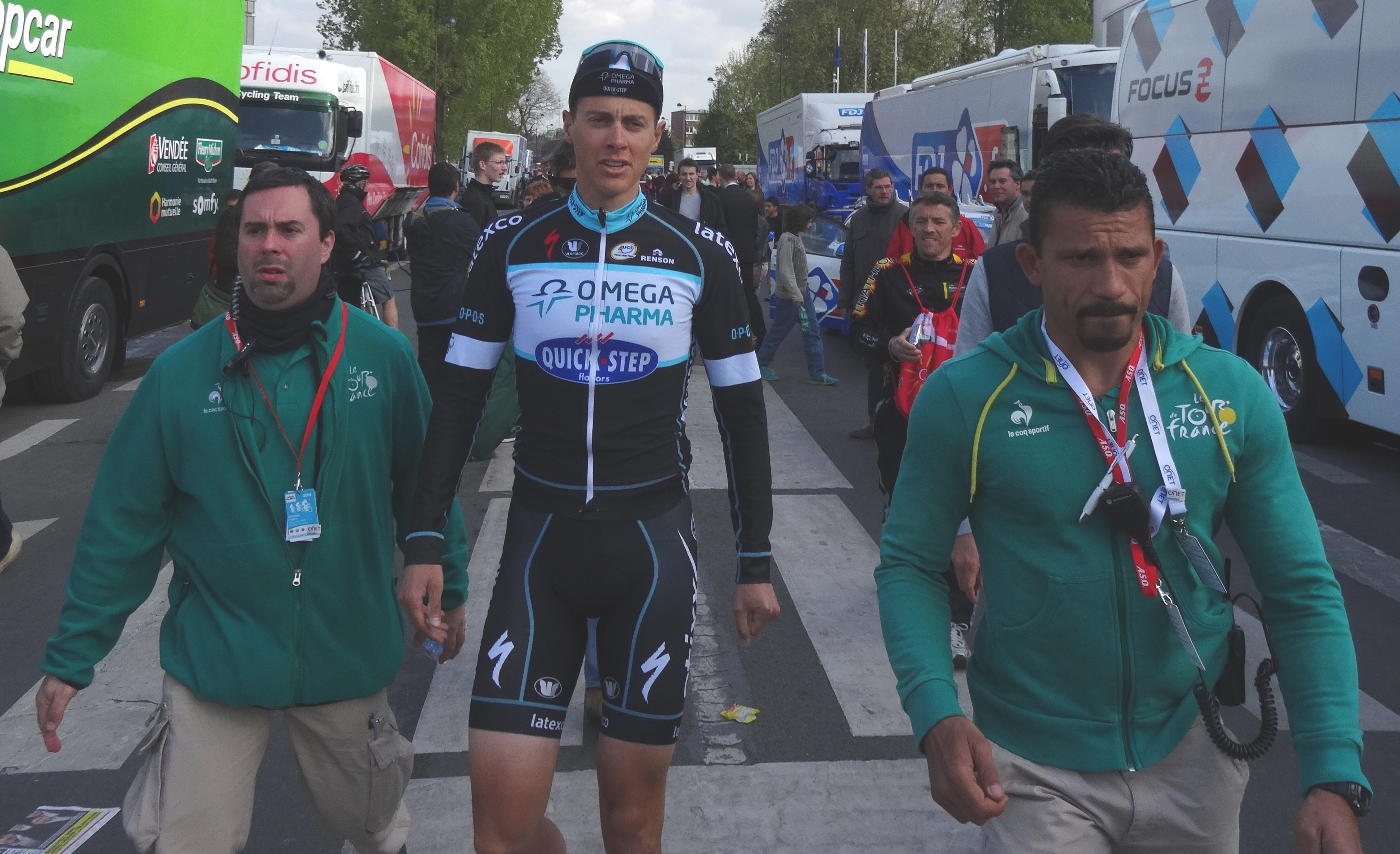 Retour des cyclistes à leurs bus après l'arrivée du Paris-Roubaix 2014 et pendant la remise des prix, le 13 avril 2014, à Roubaix, Nord, Nord-Pas-de-Calais, France. Depicted person: Niki Terpstra